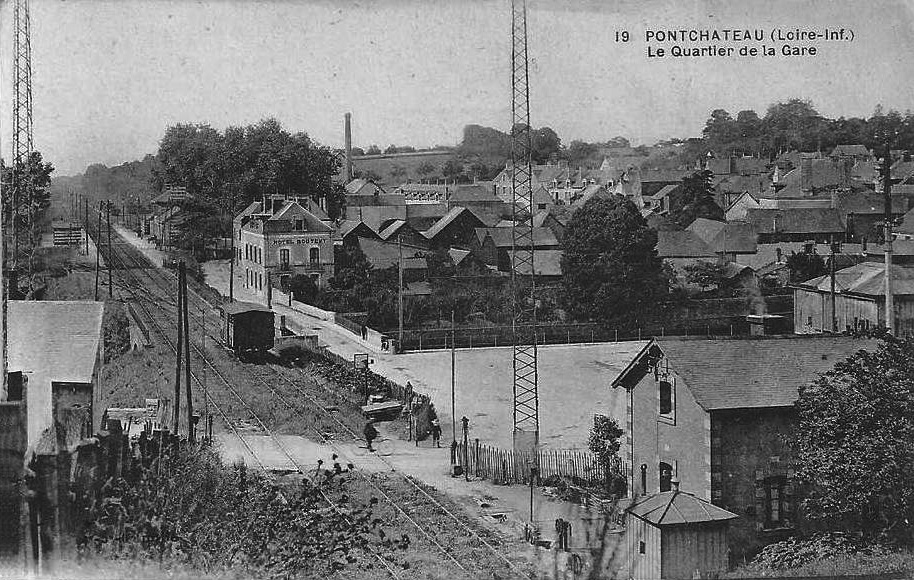 Le quartier de la gare vers 1900. Vue prise à proximité de l'entrée du tunnel. Au premier plan le passage à niveau de l'entrée de la ville, puis le pont sur le Rivet sur lequel se trouve le wagon, et la gare avec ses deux quais et le bâtiment voyageurs à droite.